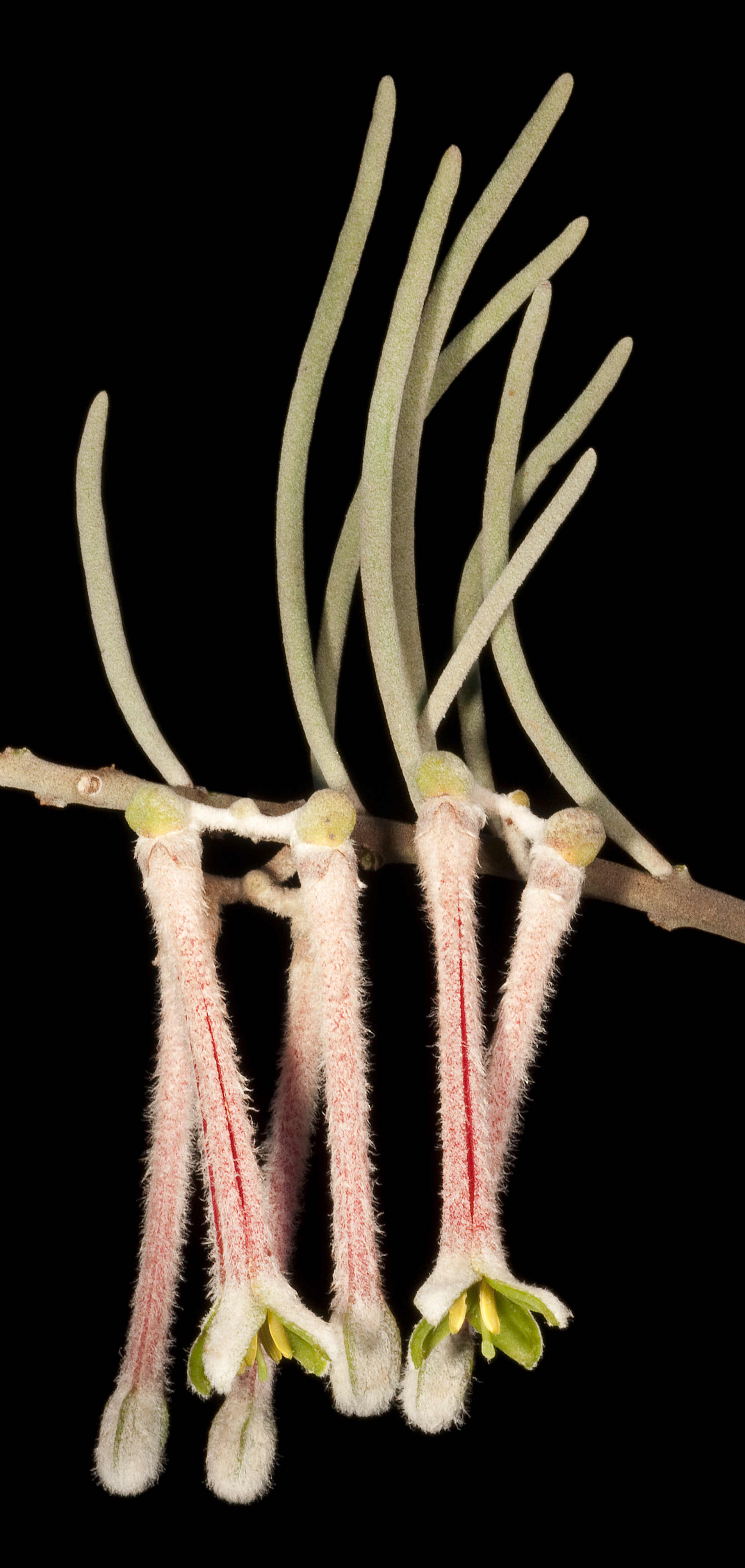 KRT4519